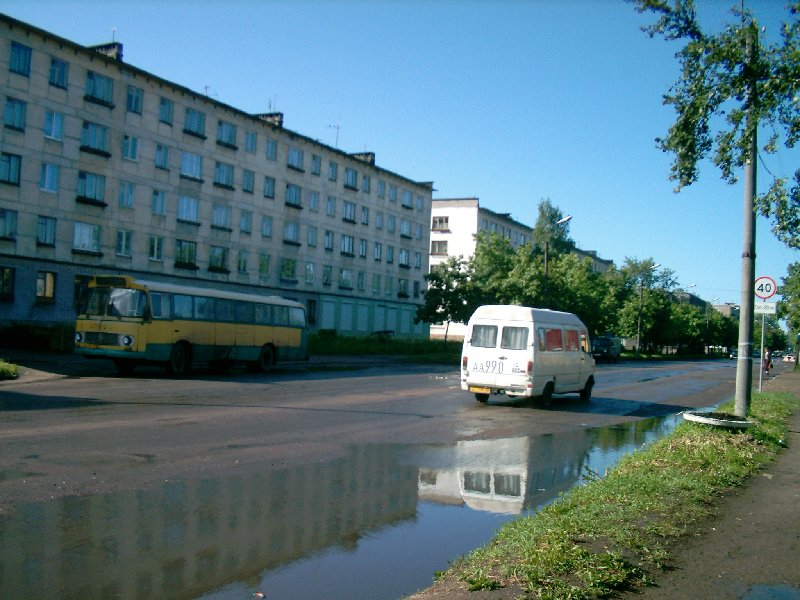 Olonets